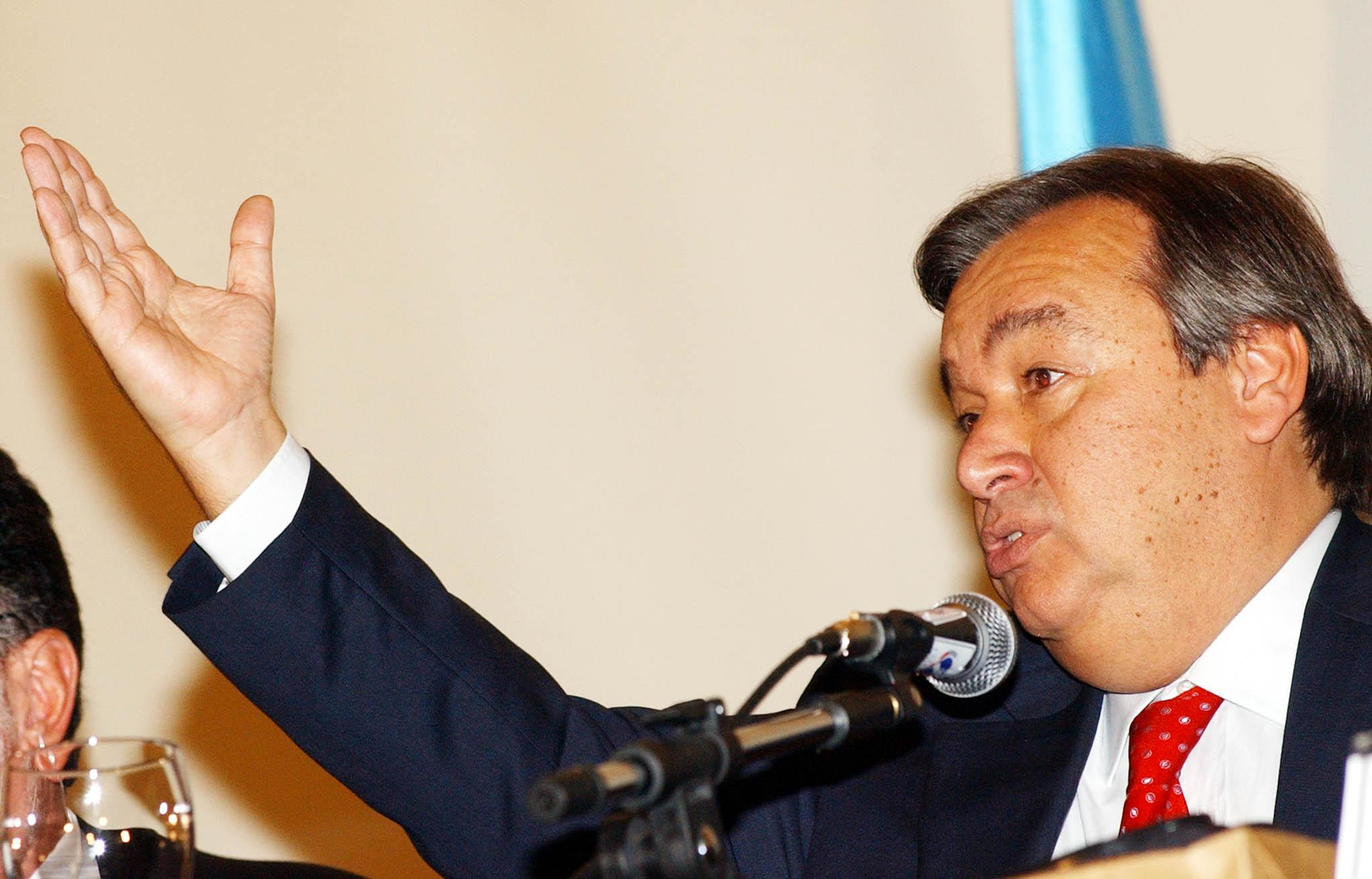 O ex-primeiro-ministro de Portugal António Guterres.